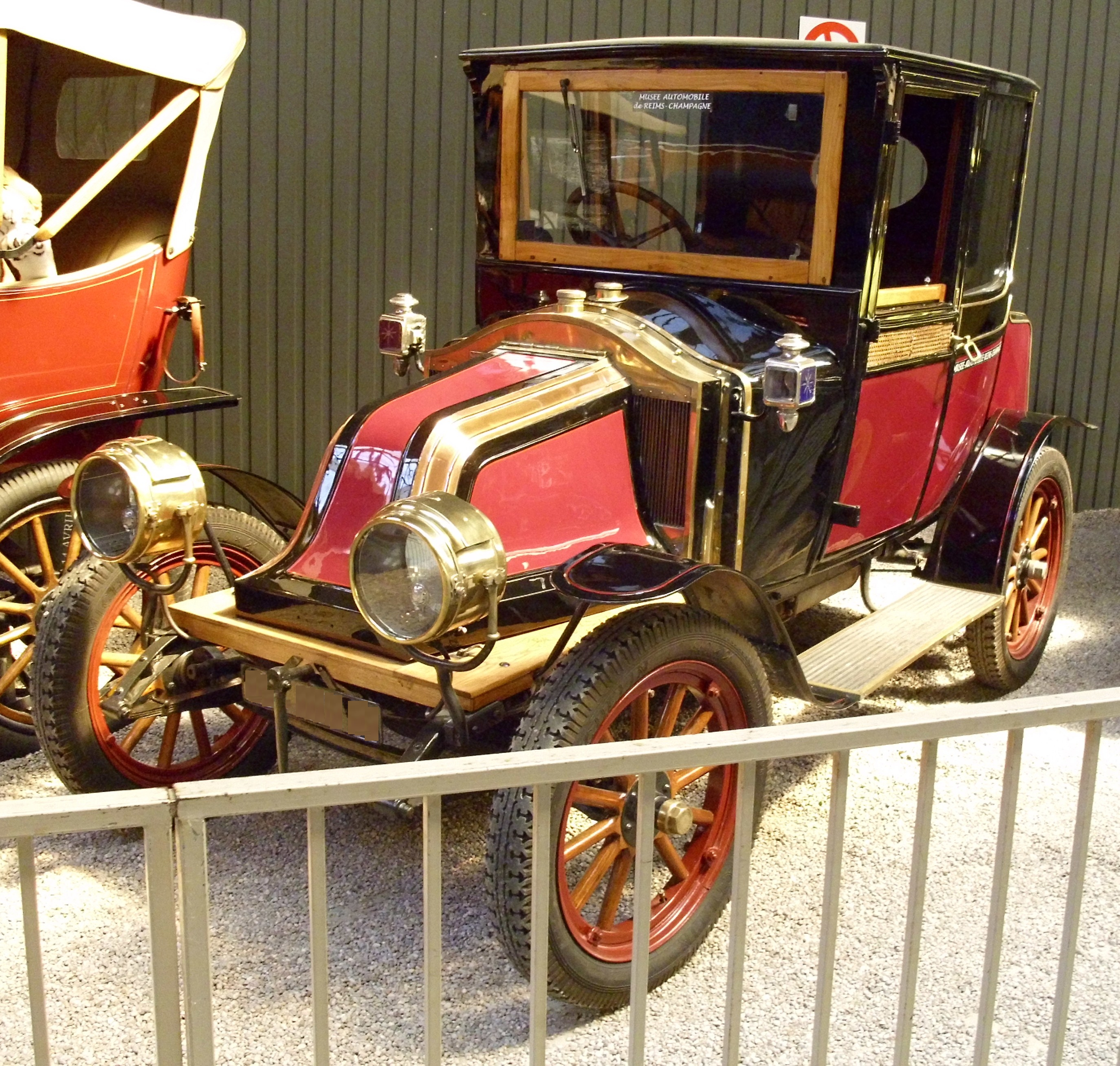 Renault Type EK Coupé 1914